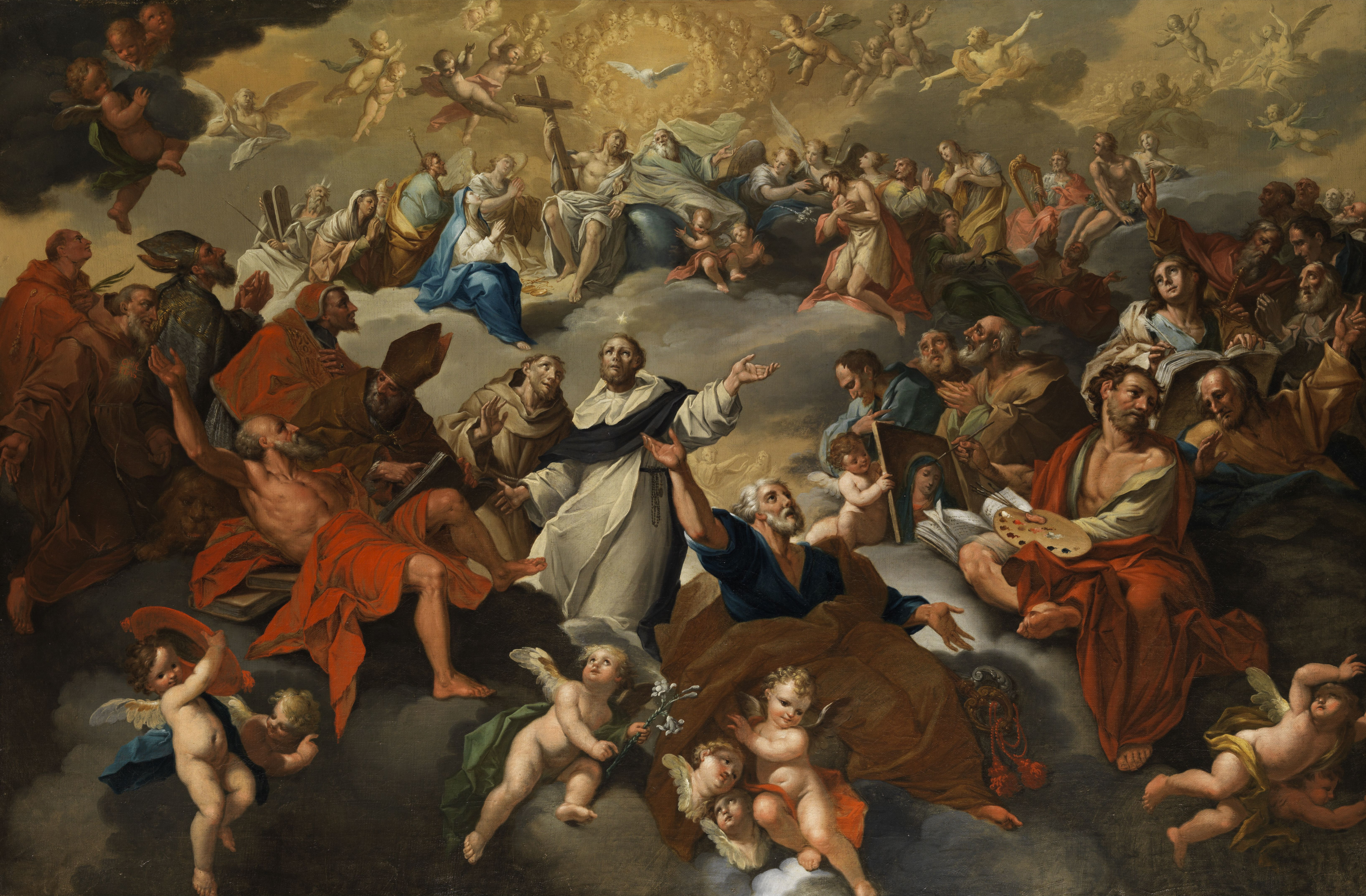 Heiligenversammlung im Paradies mit Apotheose der hl. Domenikus und Franziskus. Öl auf Leinwand. 79 x 122 cm.